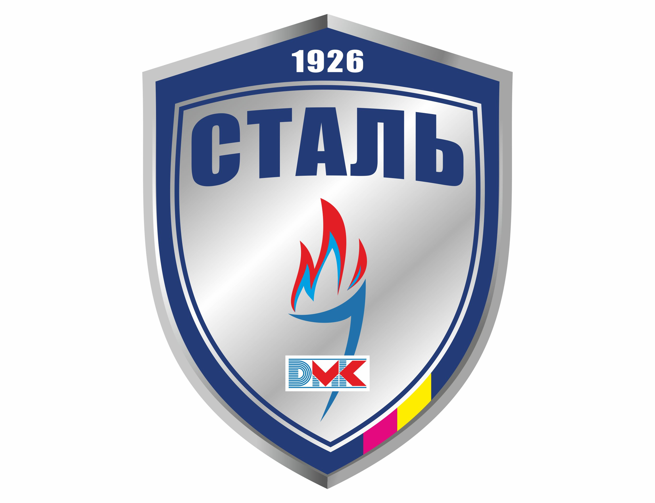 Емблема футбольного клубу «Сталь» (Кам'янське)